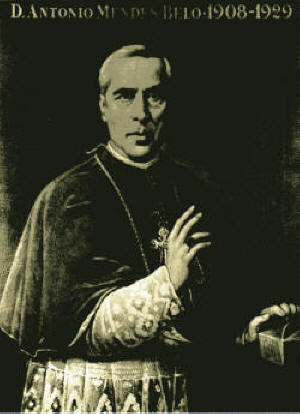 Cardeal-Patriarca António Mendes Bello